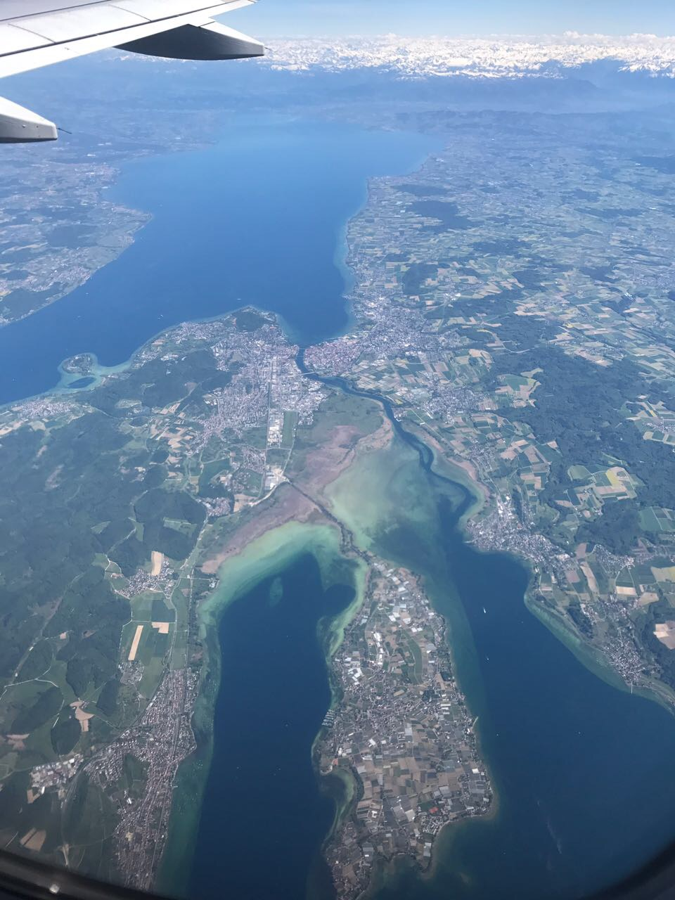 Seerhein und Insel Reichnau